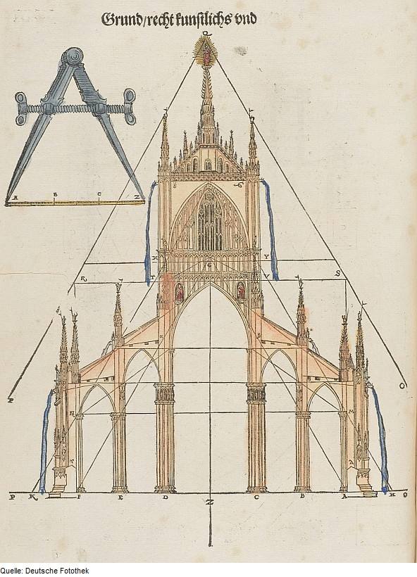 Original image description from the Deutsche Fotothek Architektur & Geometrie & Mailänder Dom & Messzirkel